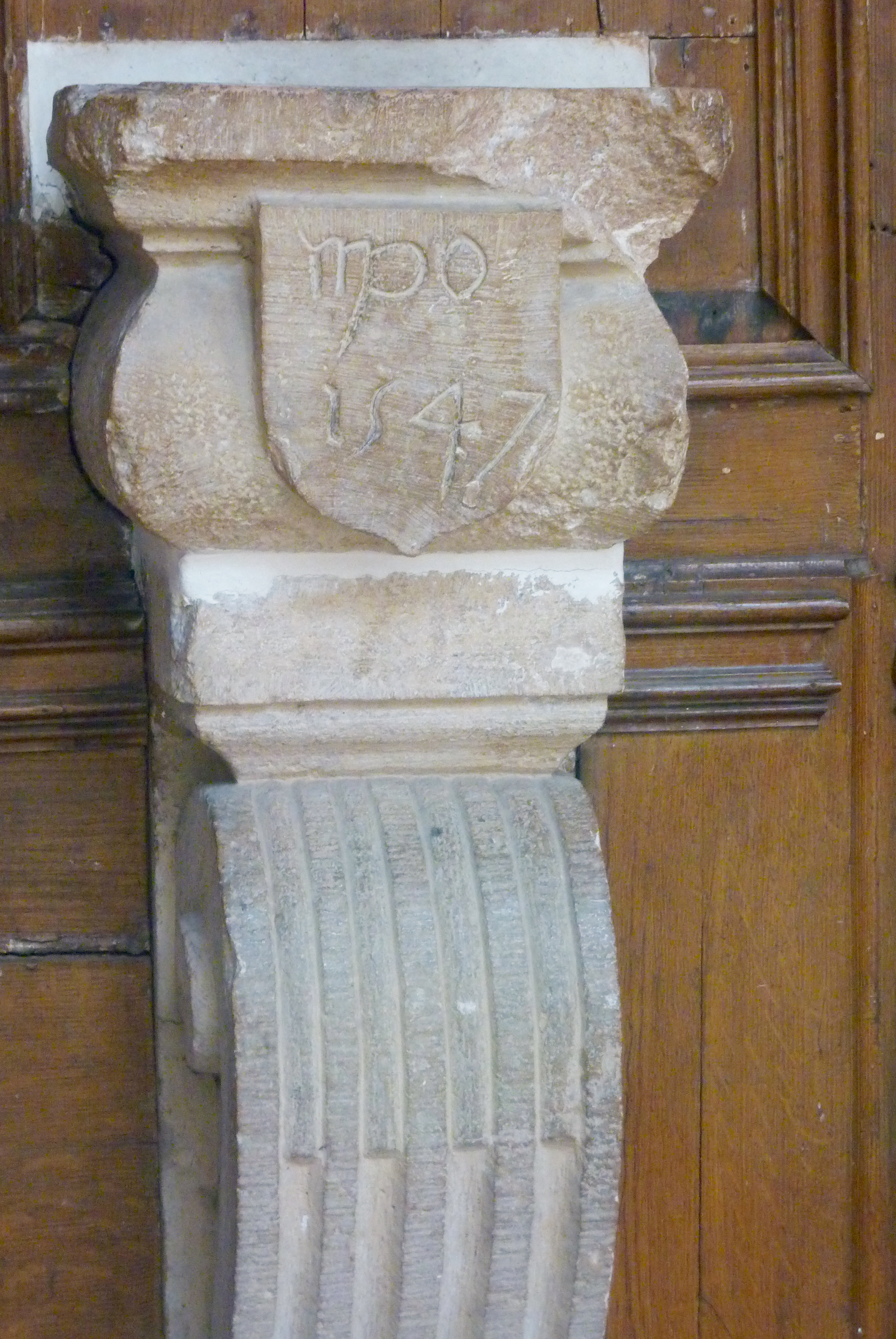 Katholische Pfarrkirche Saint-Jean-Baptiste in Nemours im Département Seine-et-Marne in der Region Île-de-France (Frankreich), Weihwasserbecken mit der Jahreszahl 1547